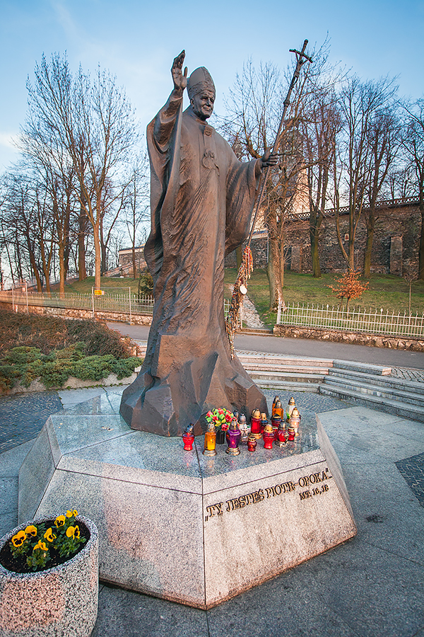 Pomnik św. Jana Pawła II ustawiony na Górze Św. Anny. Jego uroczyste odsłonięcie miało miejsce 25 czerwca 2000 r. Poświęcenia dokonał ówczesny ordynariusz opolski abp Alfons Nossol.